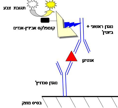 אלייזת סנדוויץ' עם נוגדן שעבר ביוטיניזציה, אליו נקשר קומפלקס של אבידין (חלבון הנקשר לביוטין) ואנזים היוצר ראקציית צבע במגע עם סובסטרט.